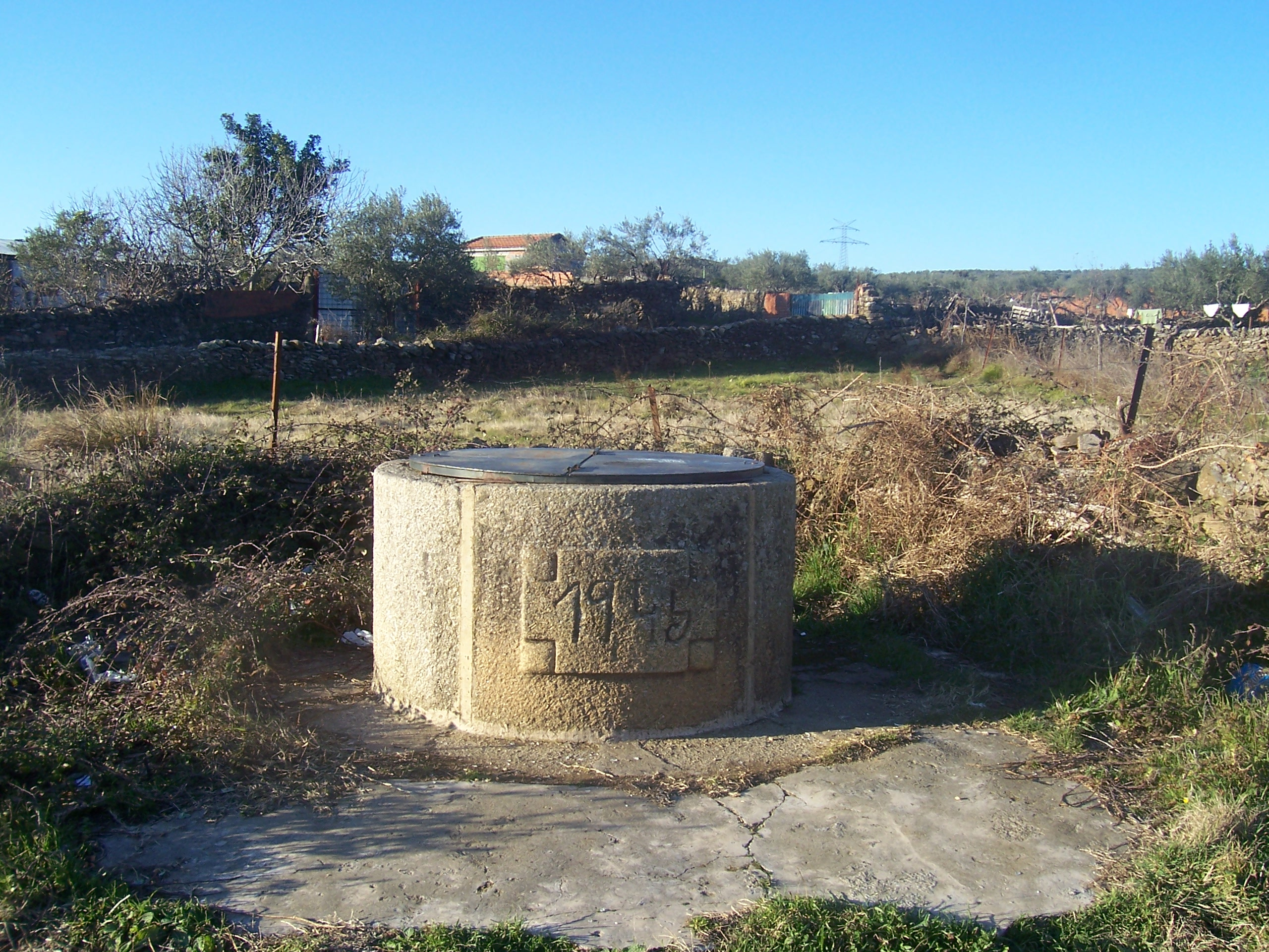 Pozo Capricho, en Montehermoso, Cáceres, España